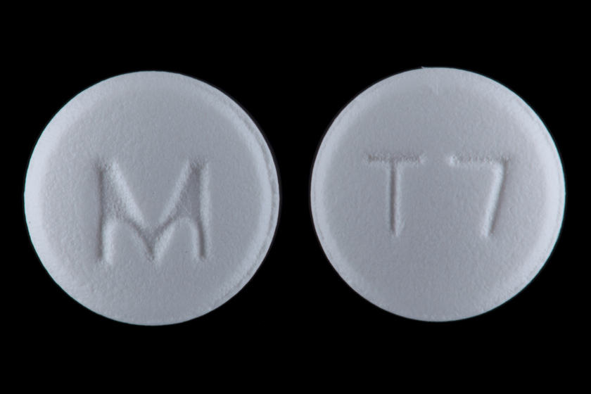 comprimé oral 50mg de Tramadol (hydrochlorure de tramadol)